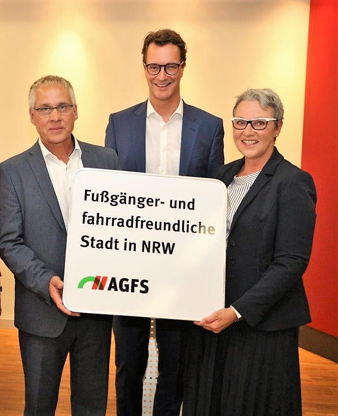 Aufnahme der Stadt Langenfeld in die AGFS